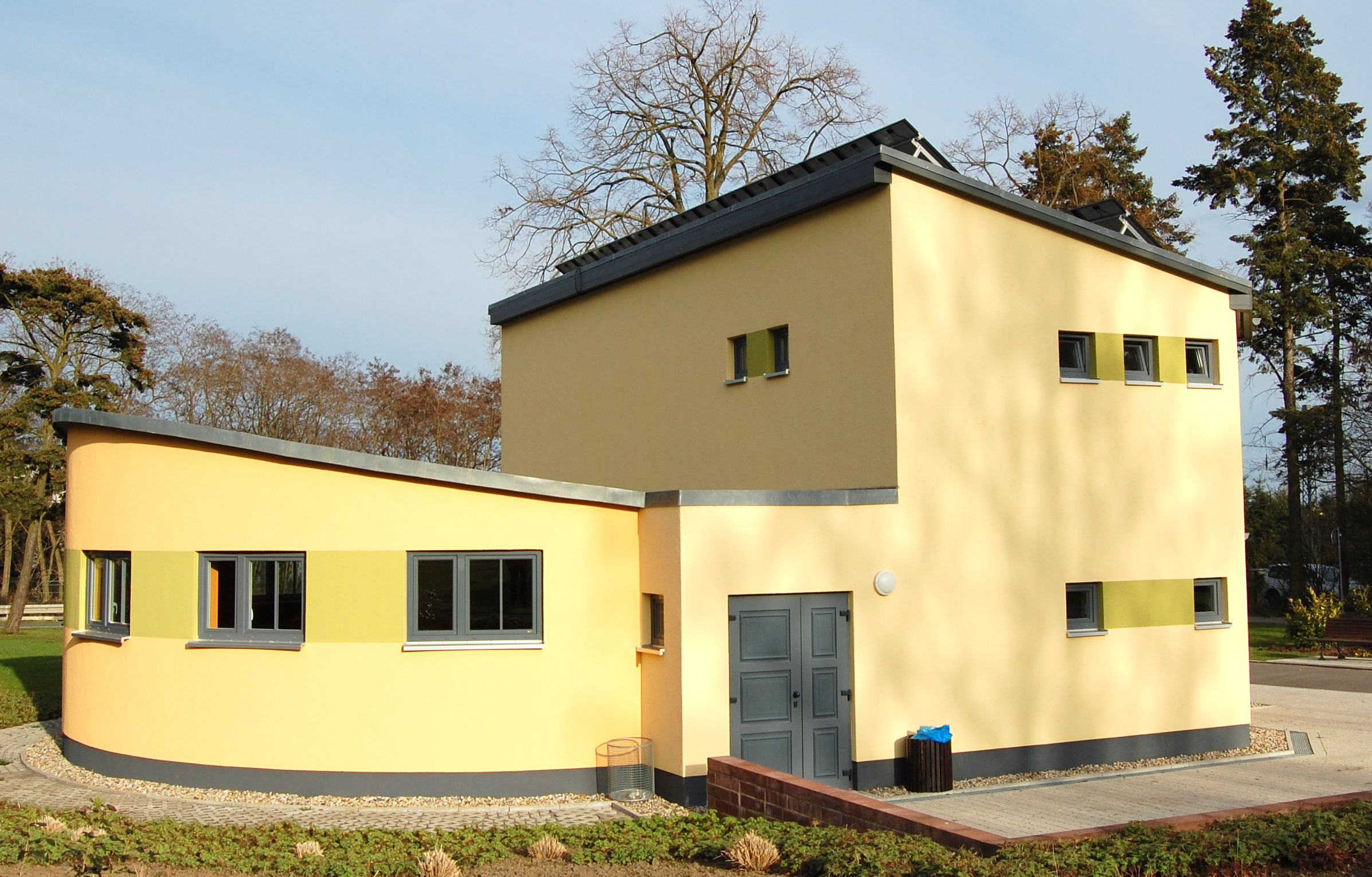 Friedhoskapelle Westerhüsen